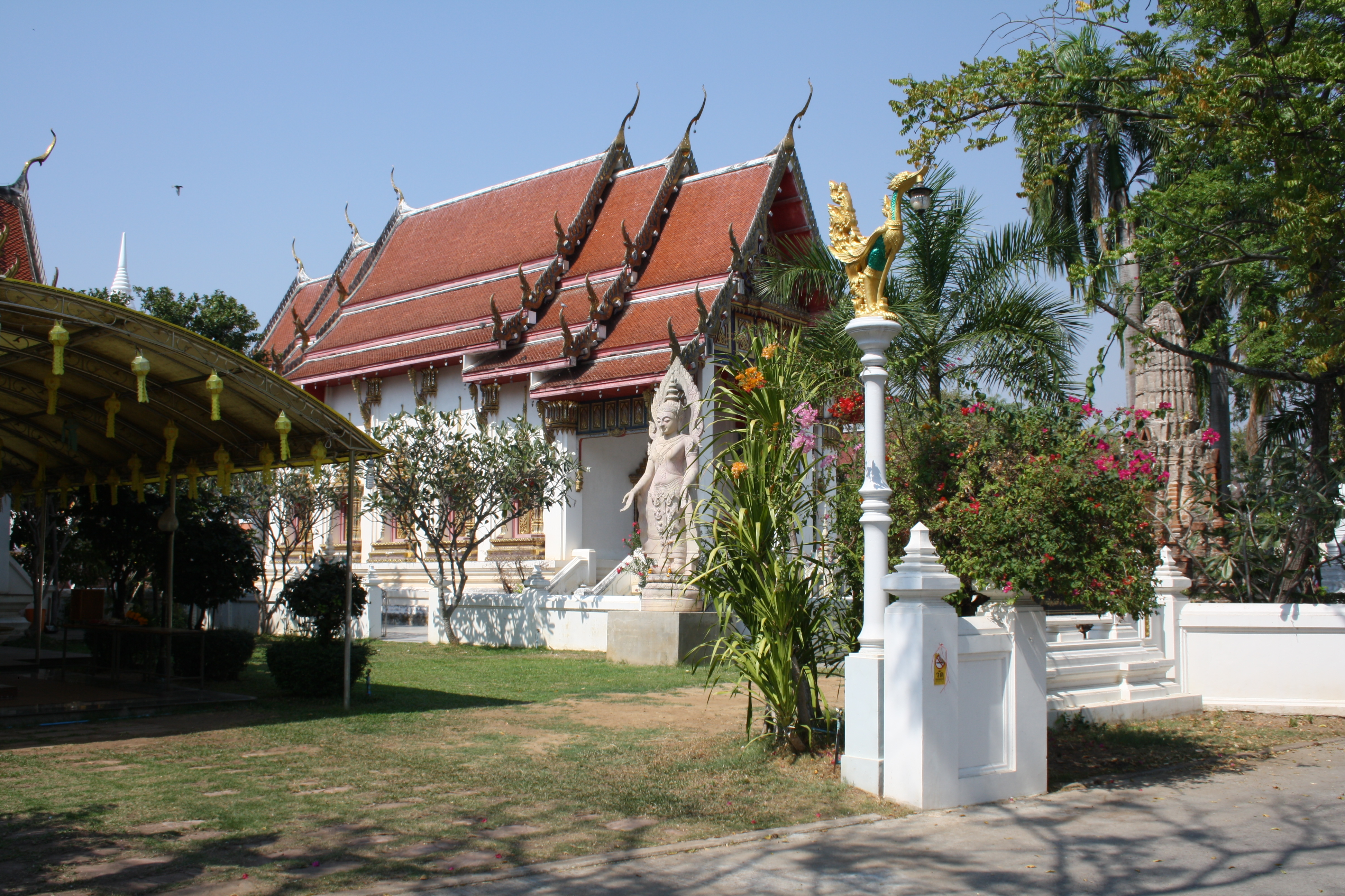 Areal des Wat Maha That in Phetchabun